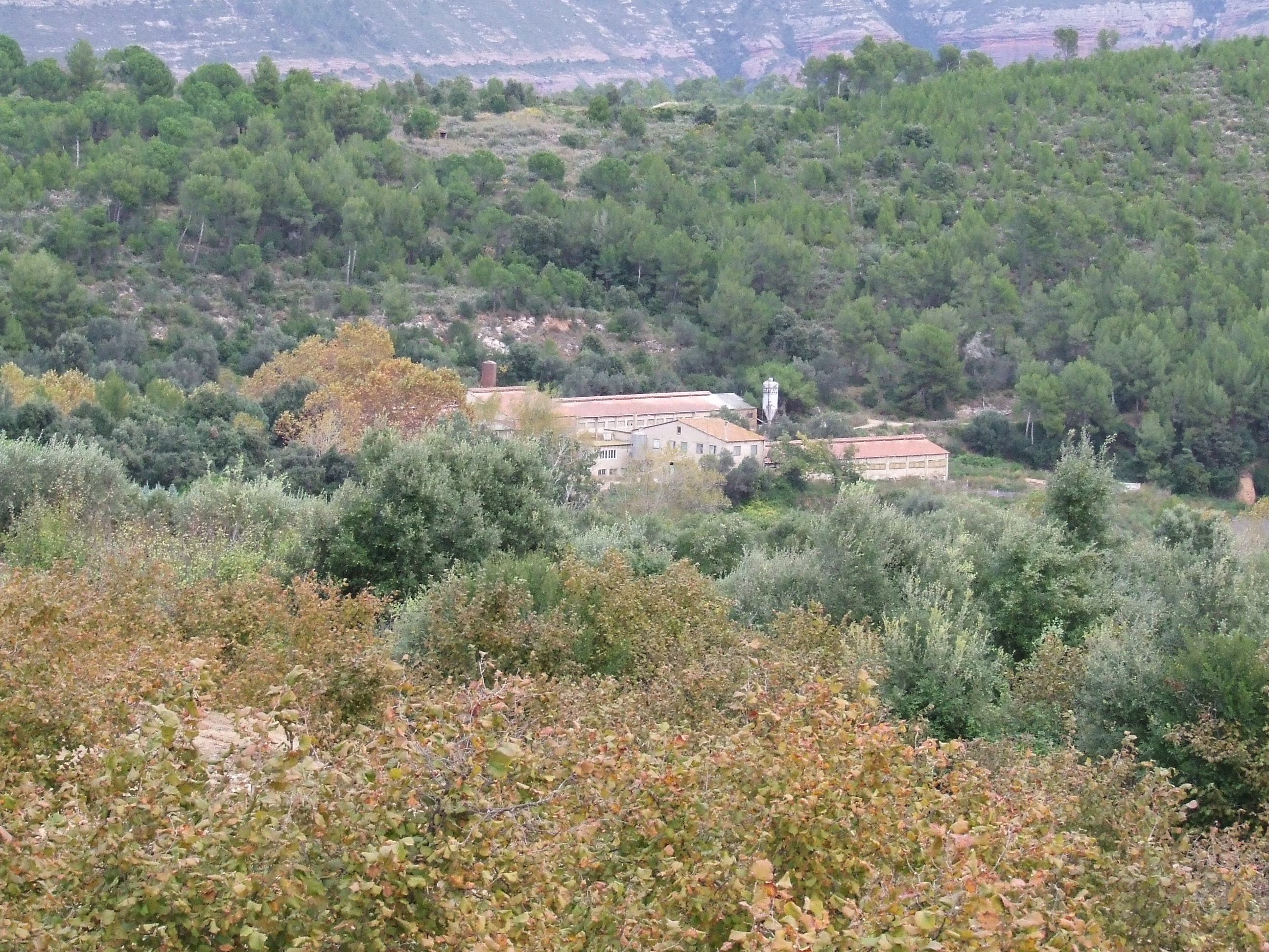 Granja de Can Garriga (Riells del Fai, Bigues i Riells, Vallès Oriental)